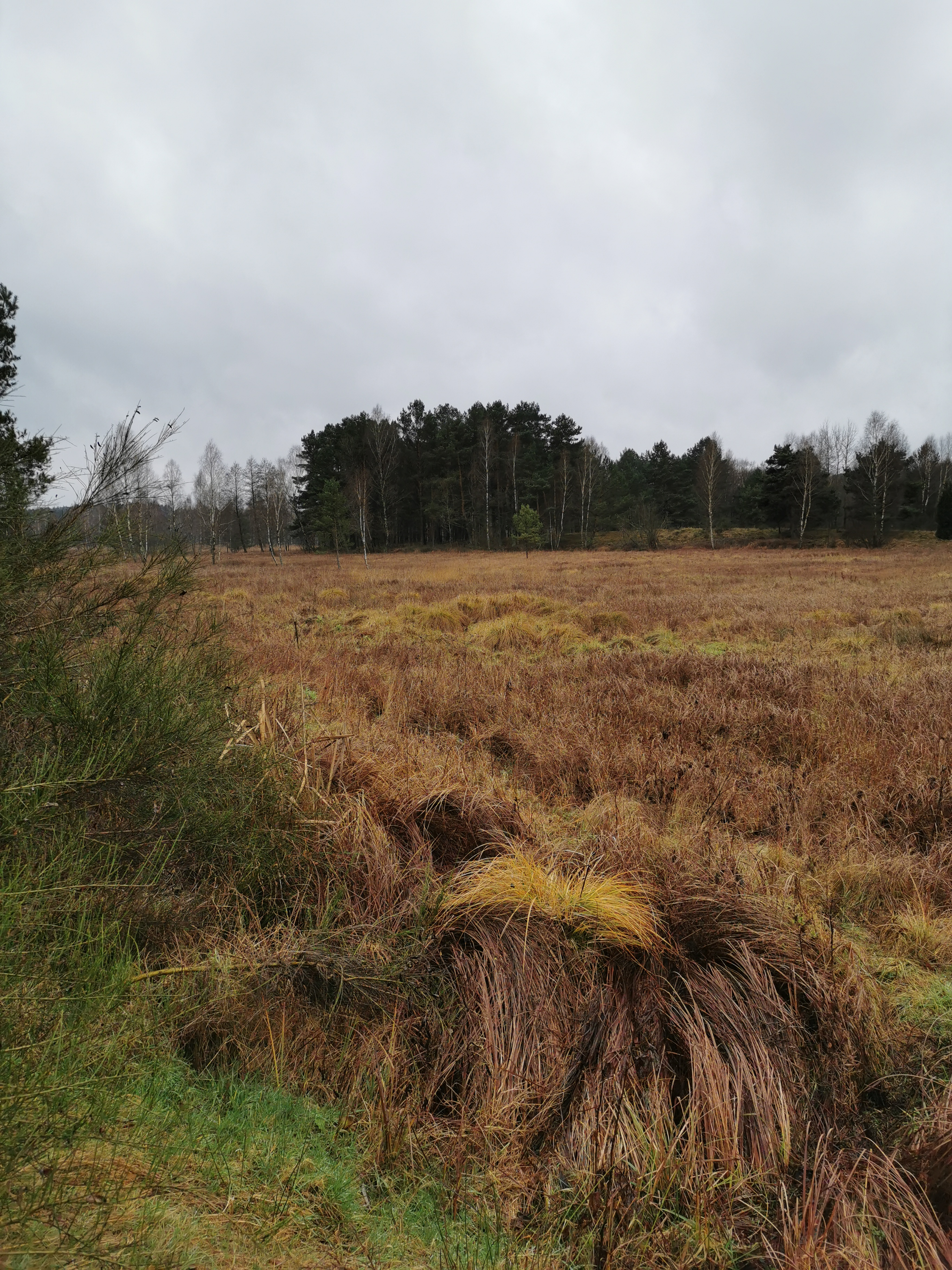 Rezerwat przyrody „Gogolewko” w gminie Dębnica Kaszubska